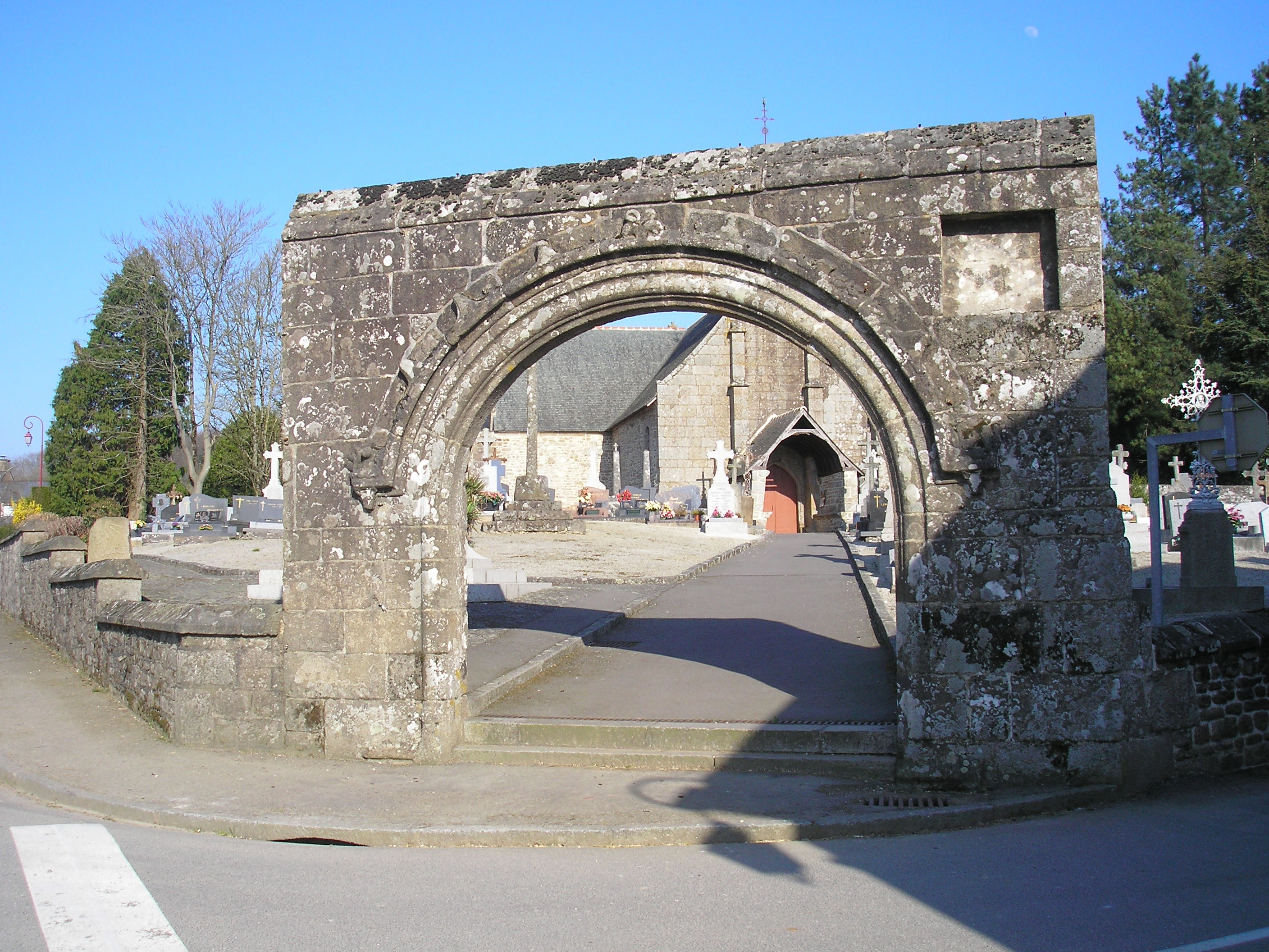 Villamée (Bretagne, France). Portail du cimetière.